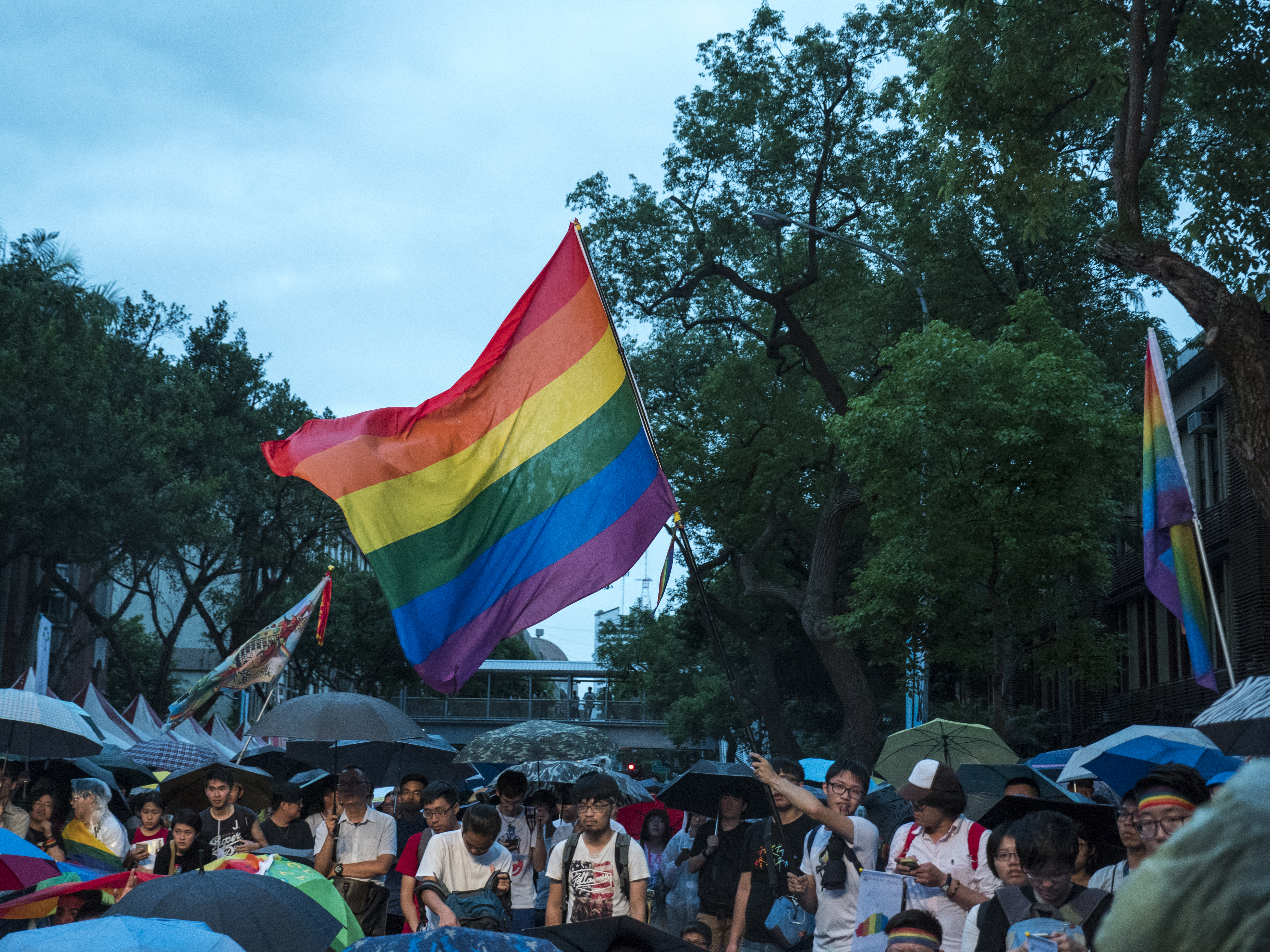 中文（台灣）: 2017點亮台灣亞洲燈塔